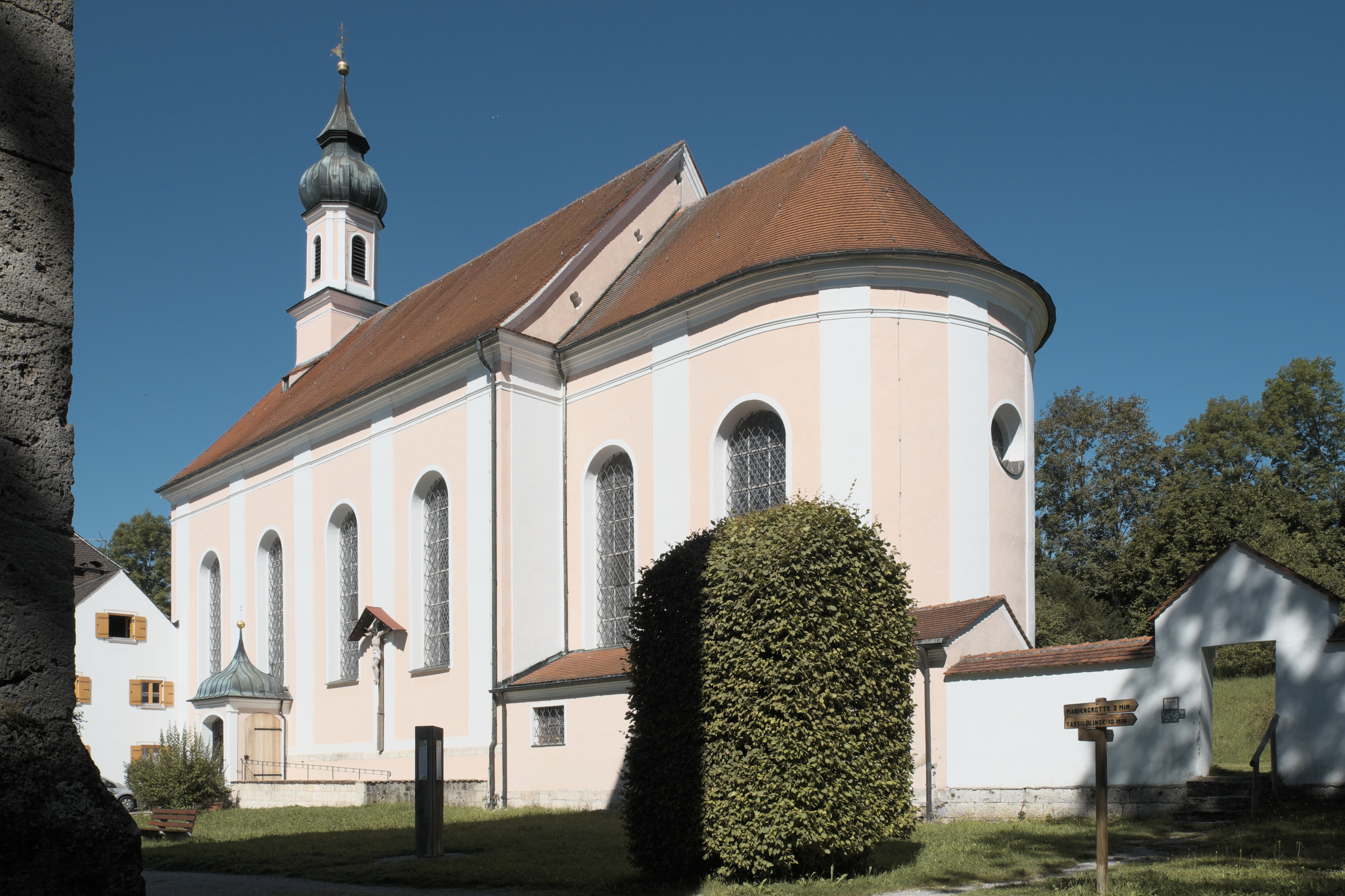 Katholische Pfarrkirche St. Johannes Baptist in Wessobrunn im Landkreis Weilheim-Schongau (Bayern/Deutschland)